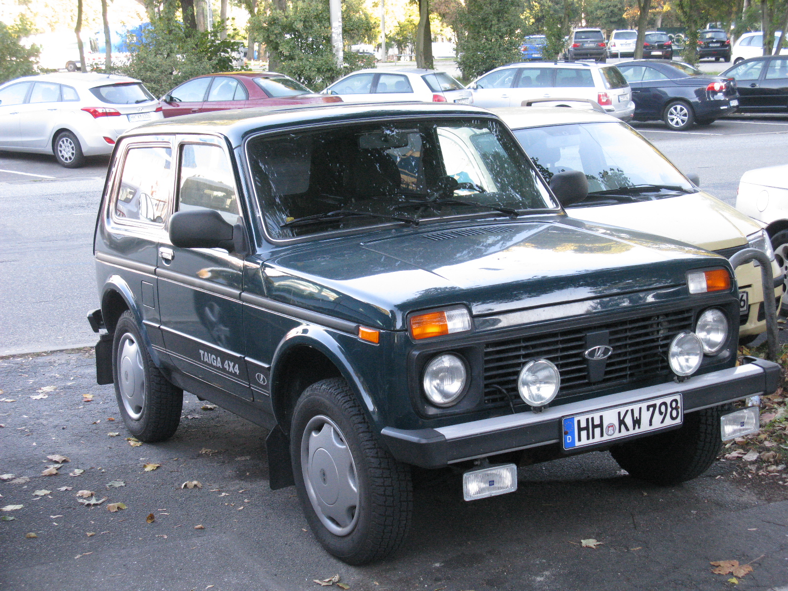 Lada Niva